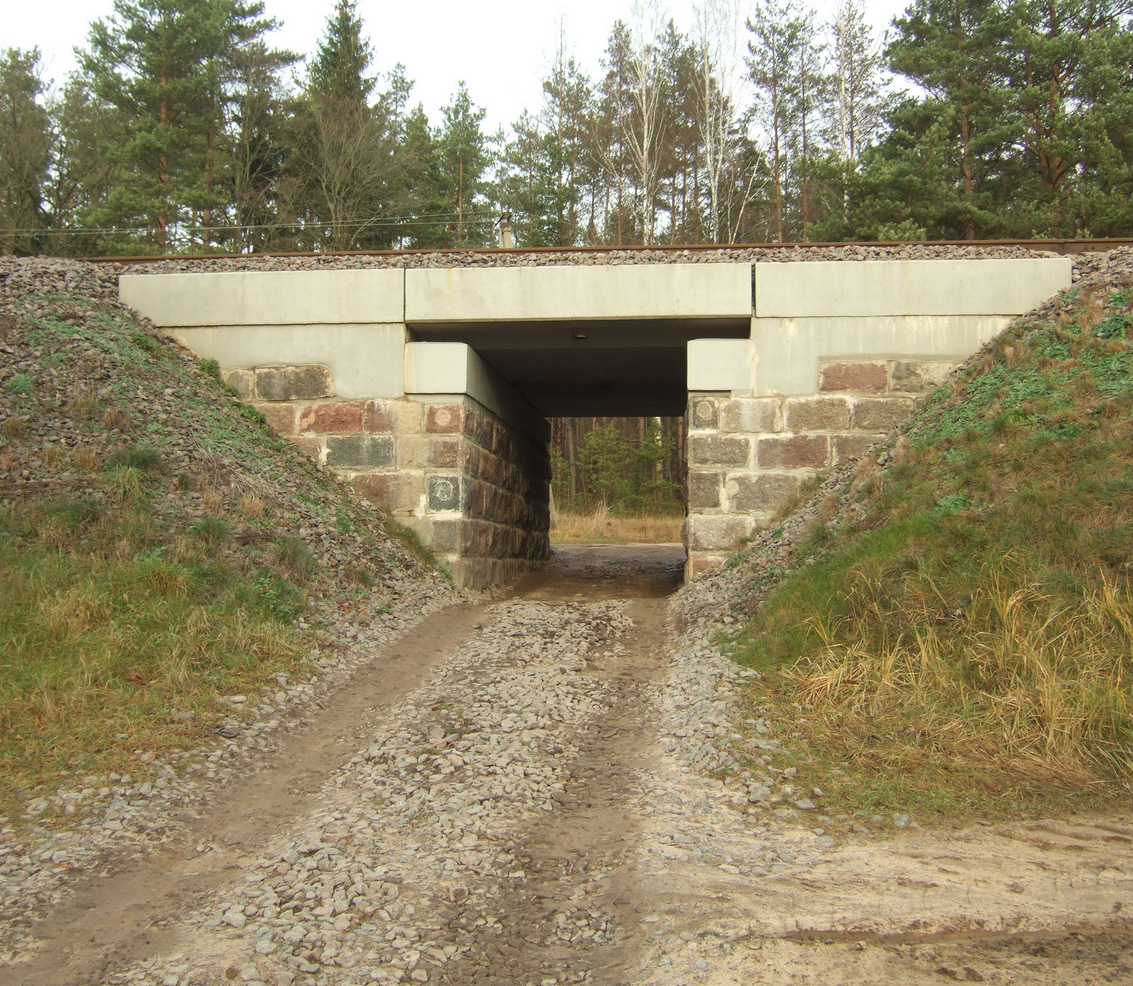 Geležinkelio viadukas Kyviškėse